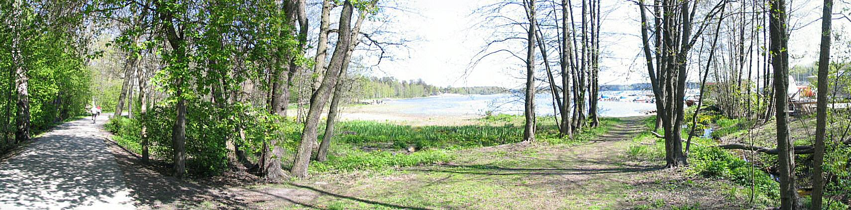 Kuva Strömsinlahdesta Helsingin Roihuvuoressa.